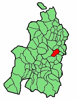 Izura-Azme udalerriaren kokapena Nafarroa Beherean